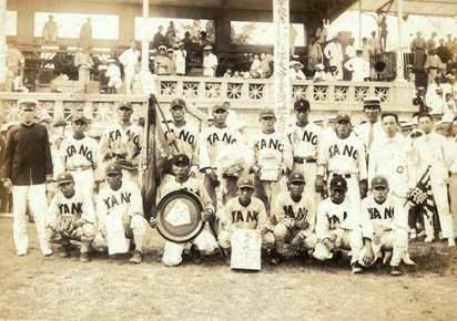 中文（台灣）: 有史以來第一次出現臺灣代表隊爭奪冠軍戰